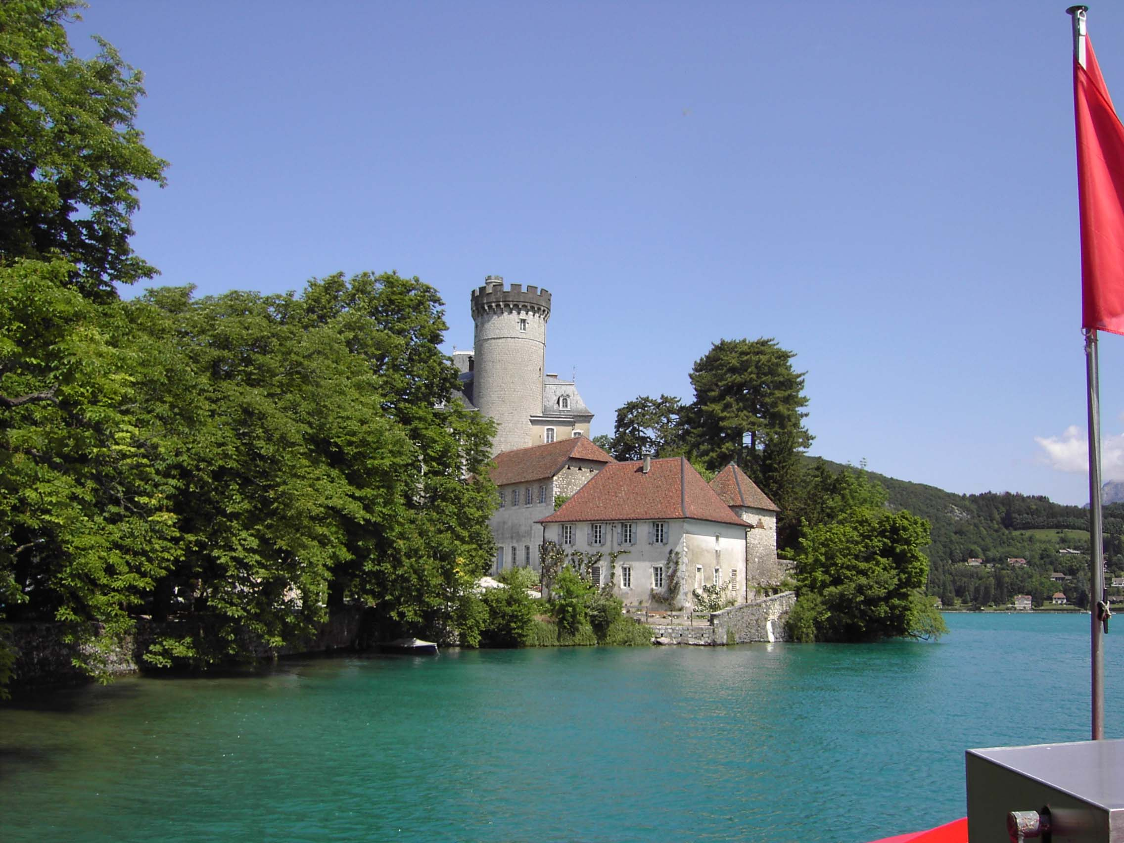 Duingt Chateau